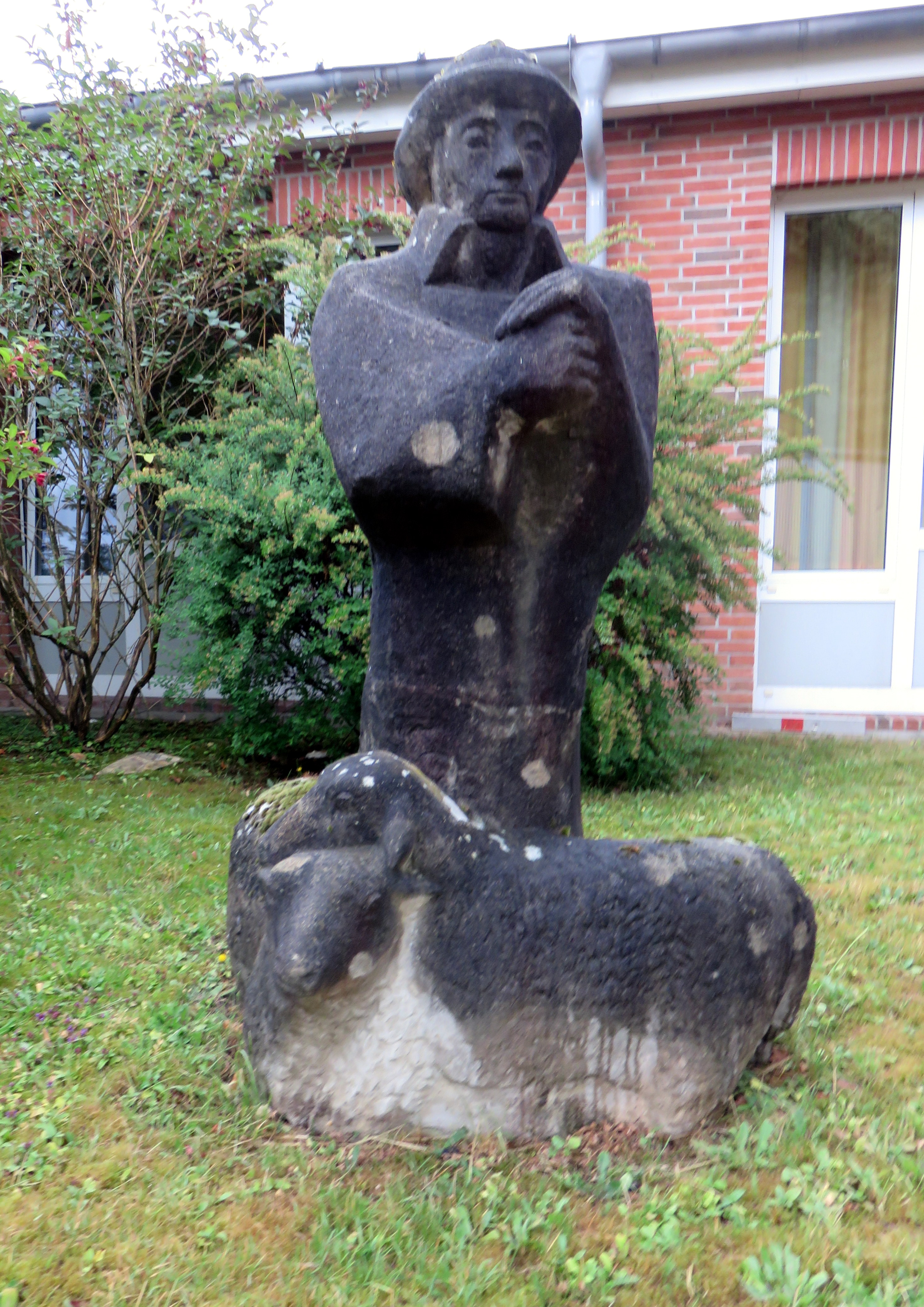 Schafhirte von Martin Irwahn, 1965, Stein, 154 hoch, Garten Haus 6, Asklepios Klinik Nord, Hamburg-Langenhorn.